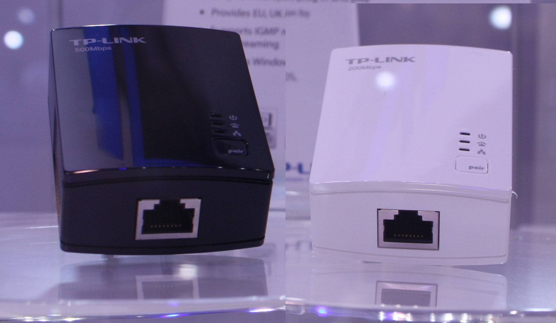 Internationale Funkausstellung 2012, TP-Link, links (schwarz) 500 Mbps und rechts (weiß) 200 Mbps